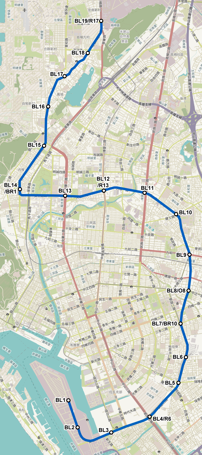 高雄捷運藍線 1993年版本